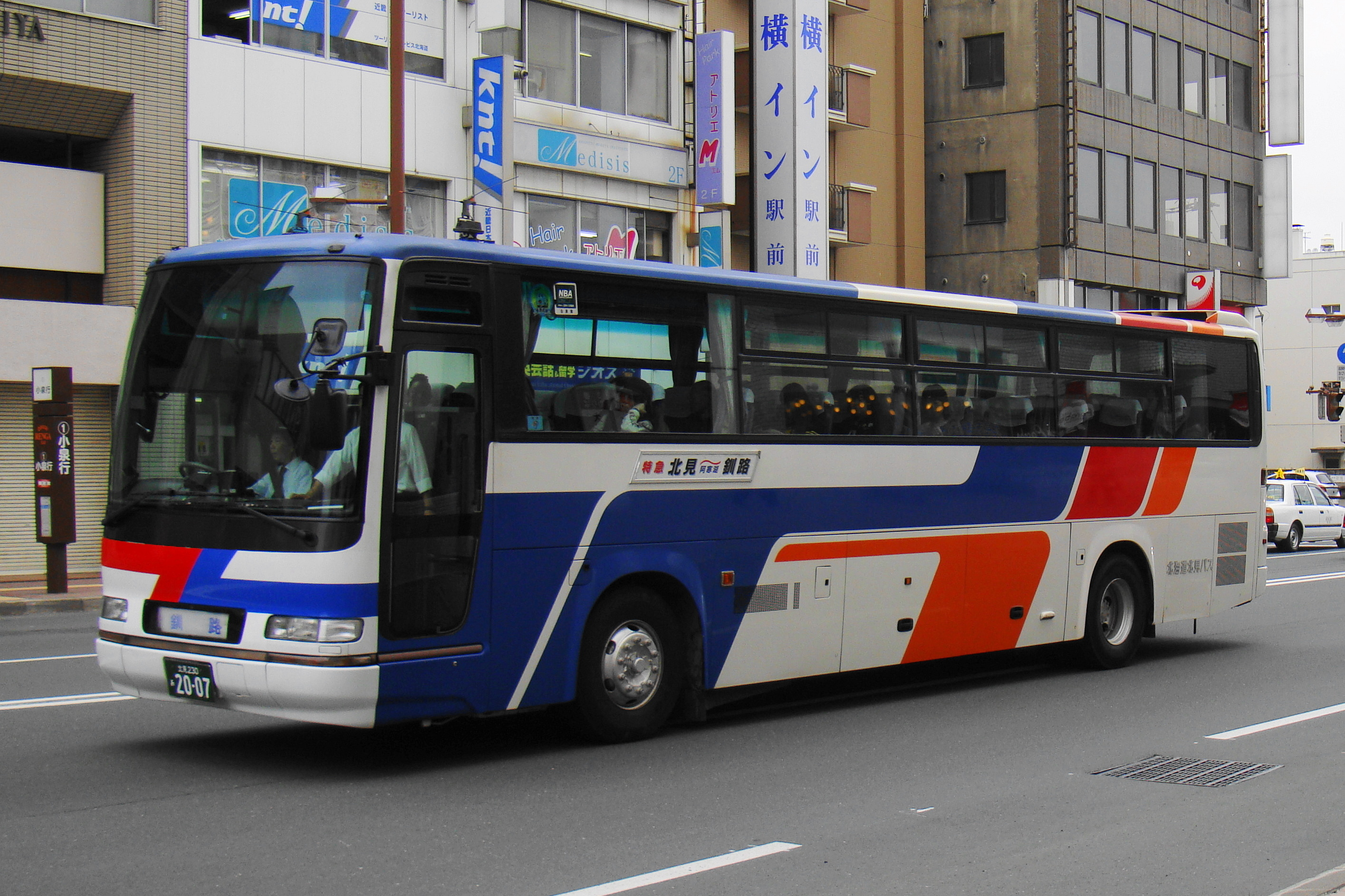 "Tokkyū Senpoku gō" Kitami to Kushiro